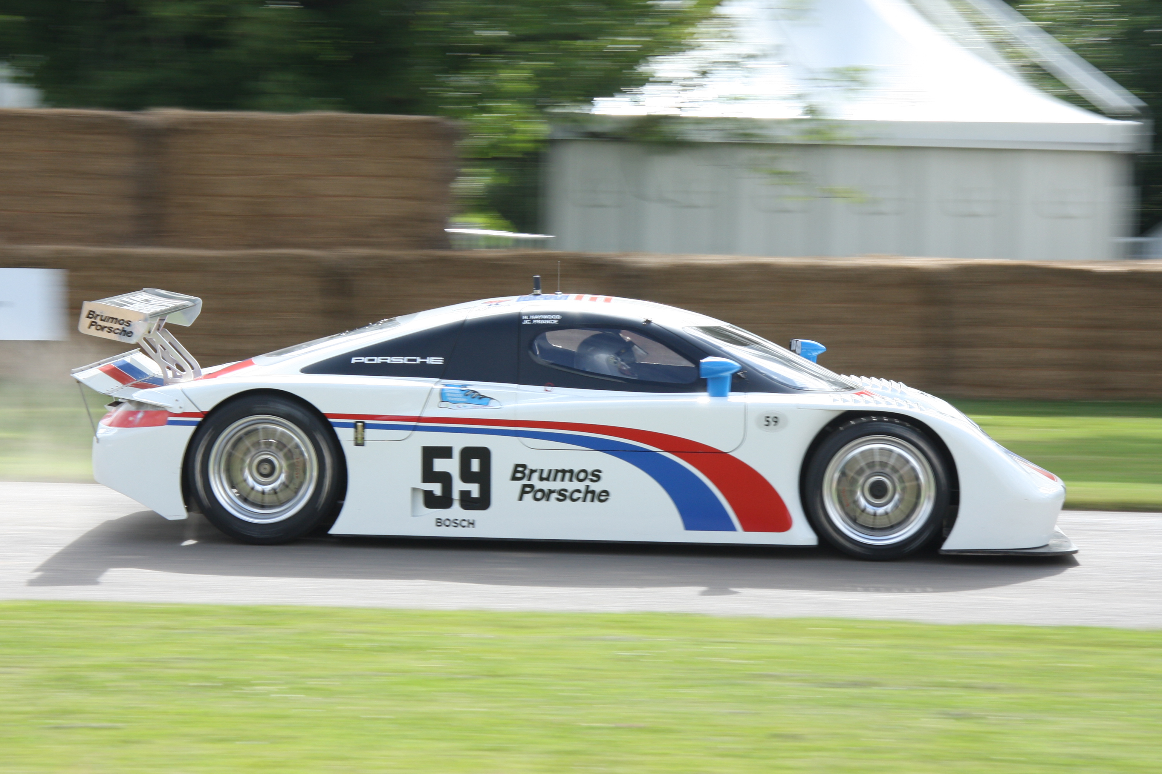 Built 2003. 3.6 litre flat 6